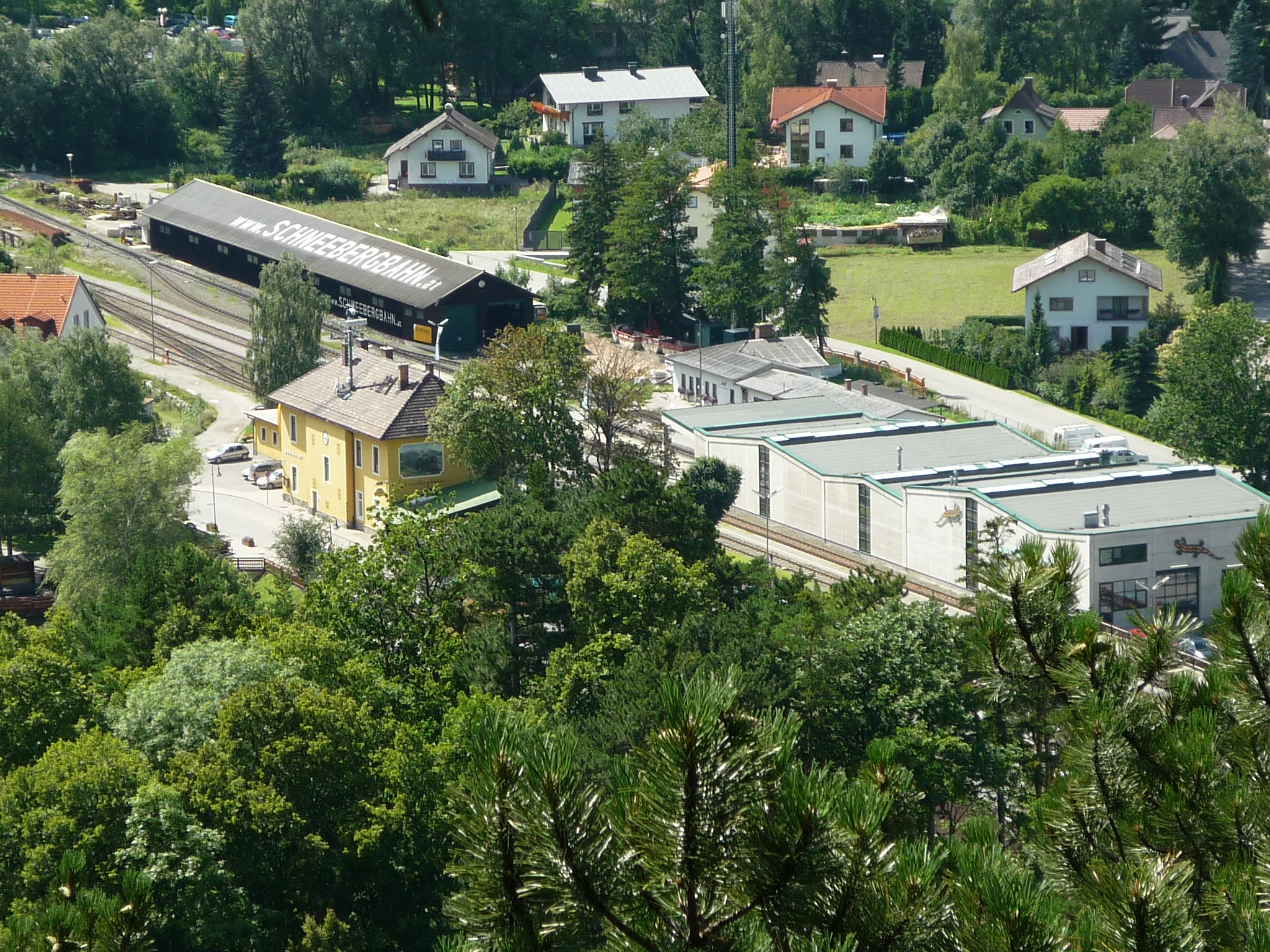 Der Talbahnhof der Schneebergbahn im Gemeindezentrum von der Marktgemeinde Puchberg am Schneeberg im südlichen Niederösterreich